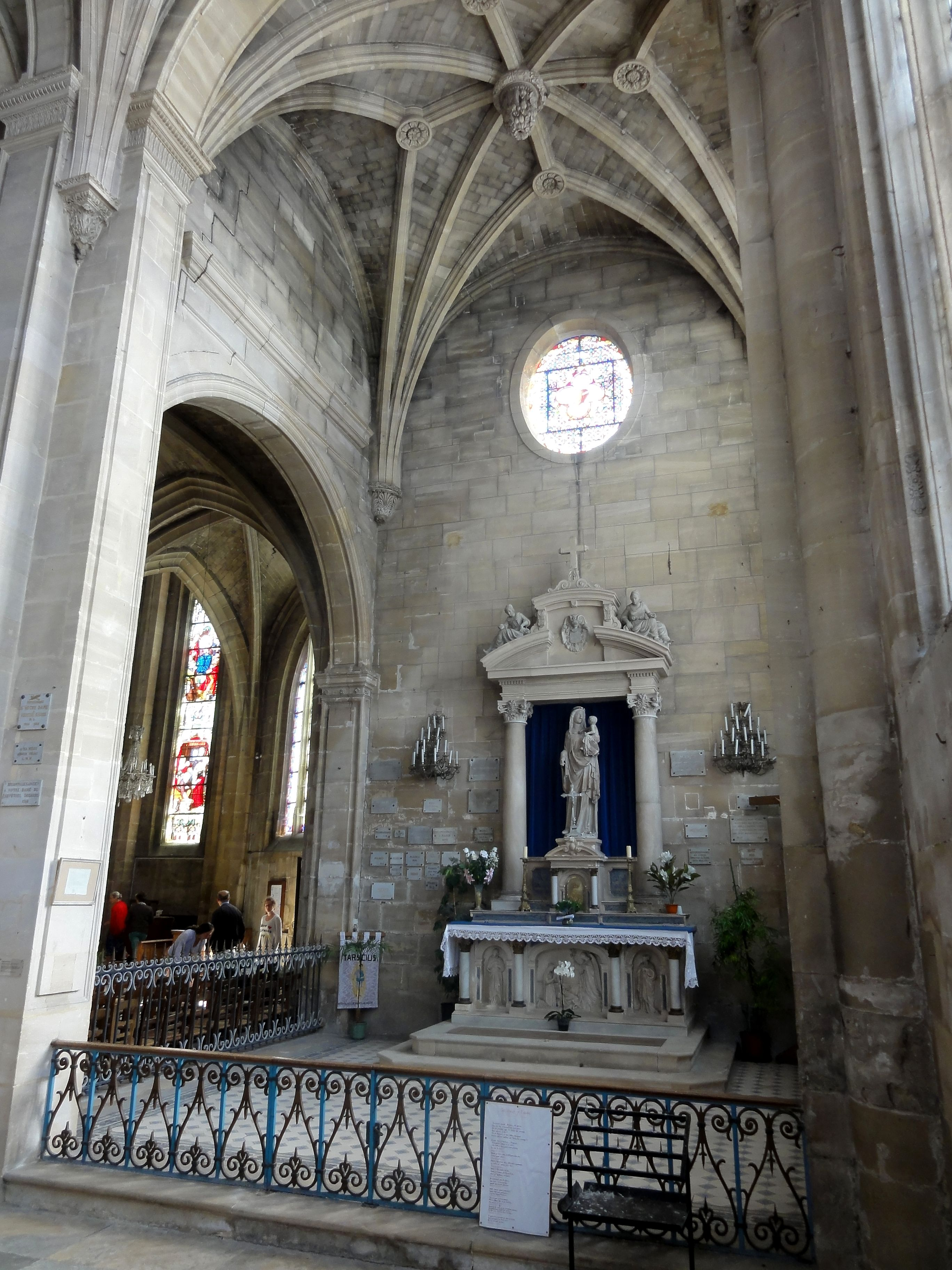 Croisillon sud, vue vers l'est dans la chapelle de la Vierge.